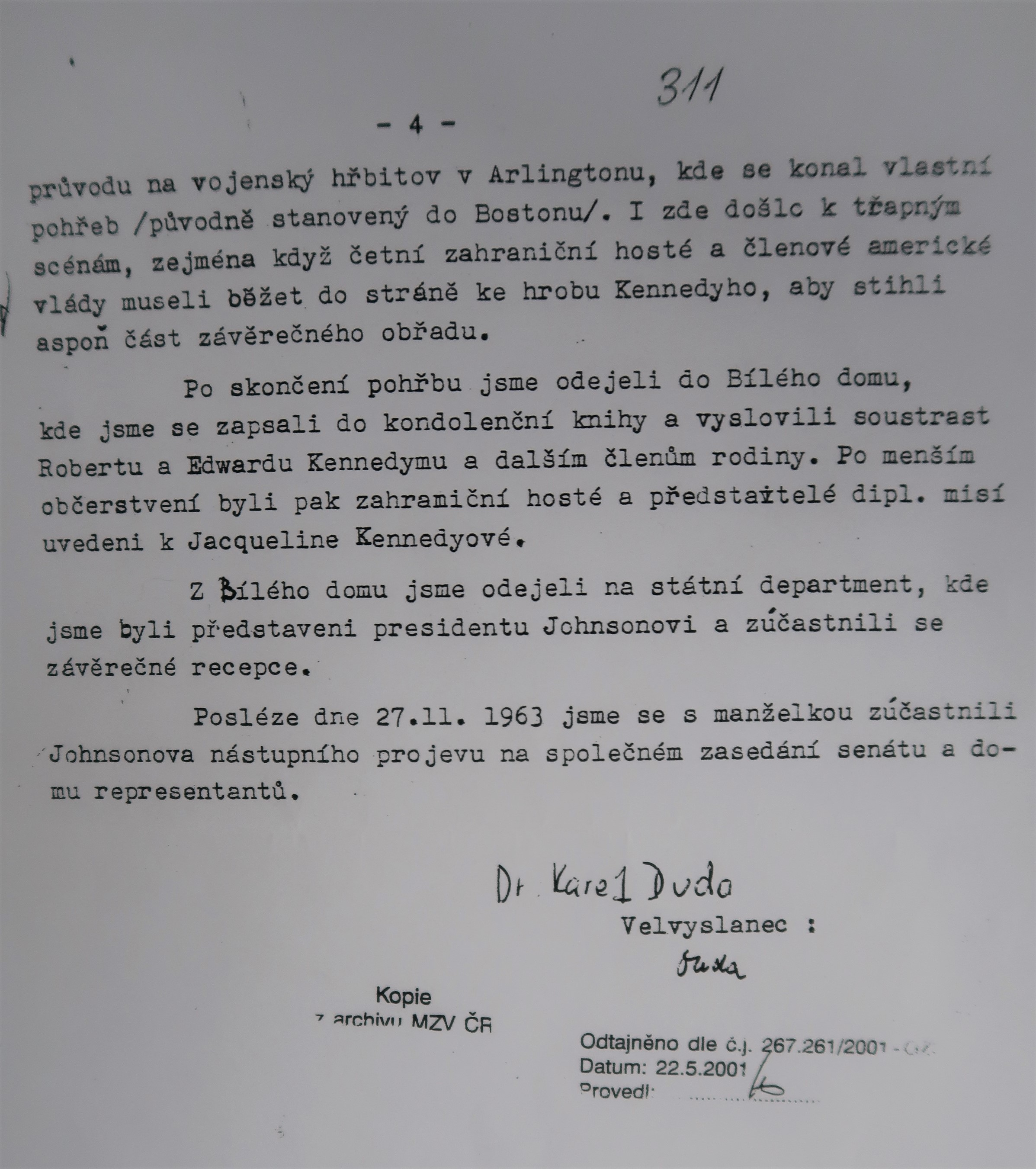 Poslední strana diplomatické zprávy z pohřbu prezidenta J. F. Kennedyho s podpisem československého velvyslance Karla Dudy z archivu ministerstva zahraničí